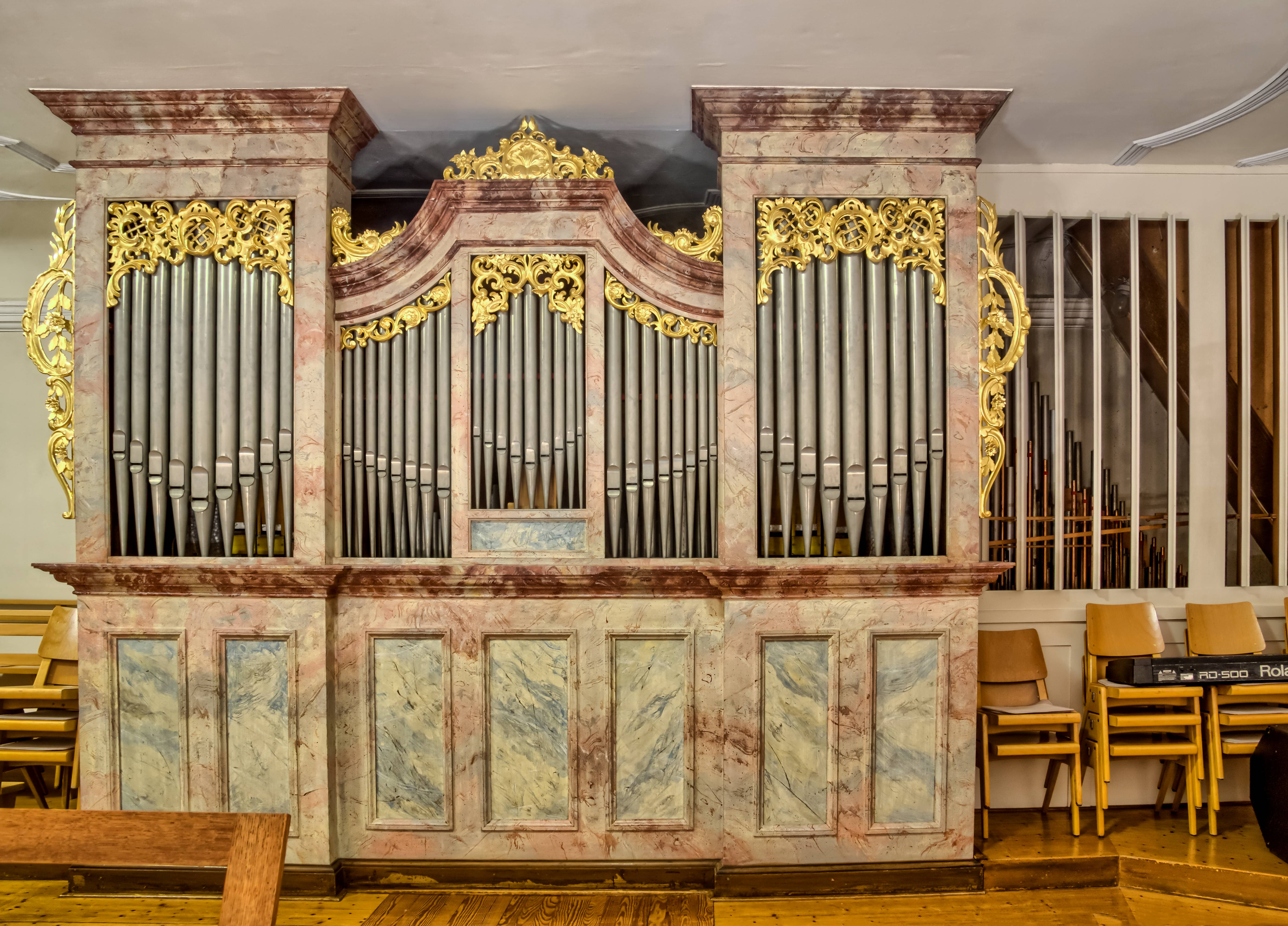 Bilder aus St. Cyriak in Freiburg Lehen Die Orgel